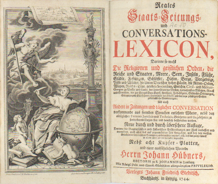 Philipp Balthasar Sinold von Schütz, Reales Staats- Zeitungs und Conversations-Lexicon, Leipzig: Gelditsch, 1744 (Kupfer und Titelblatt)